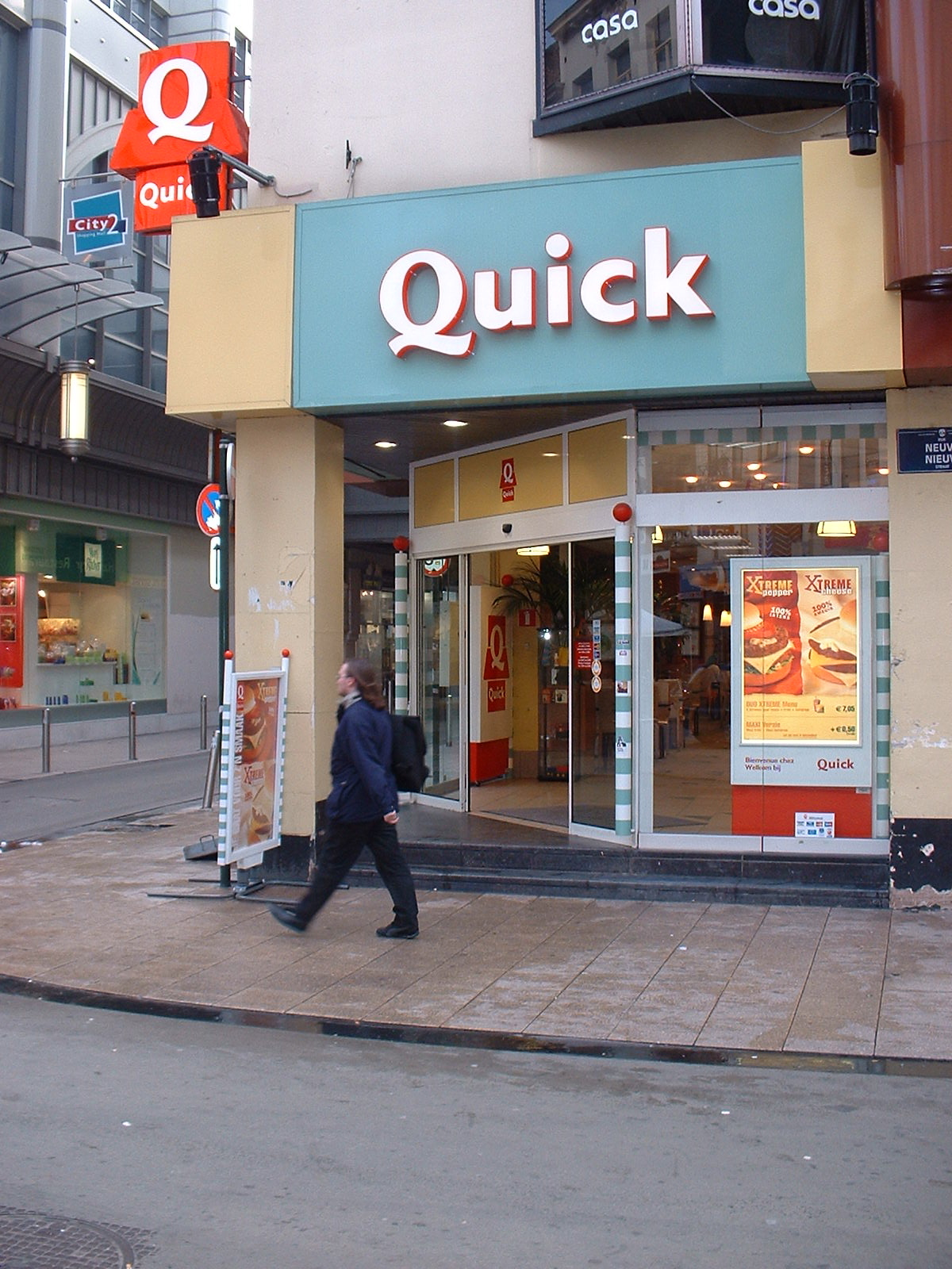 Quick restaurant in Brussels.